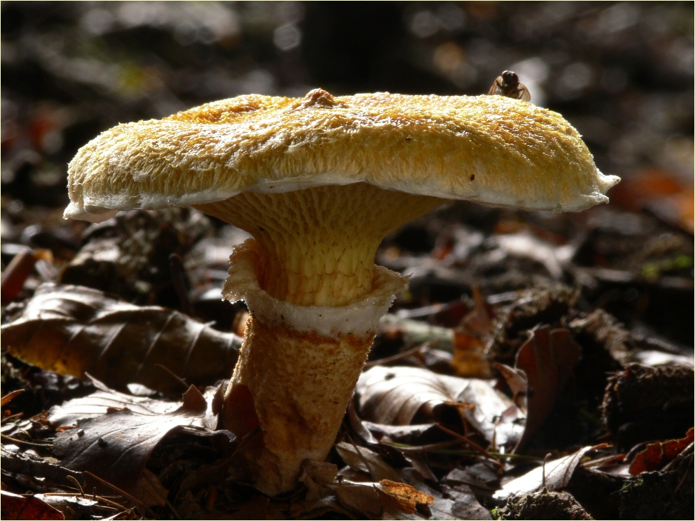 Hohlfußröhrling (Suillus cavipes)